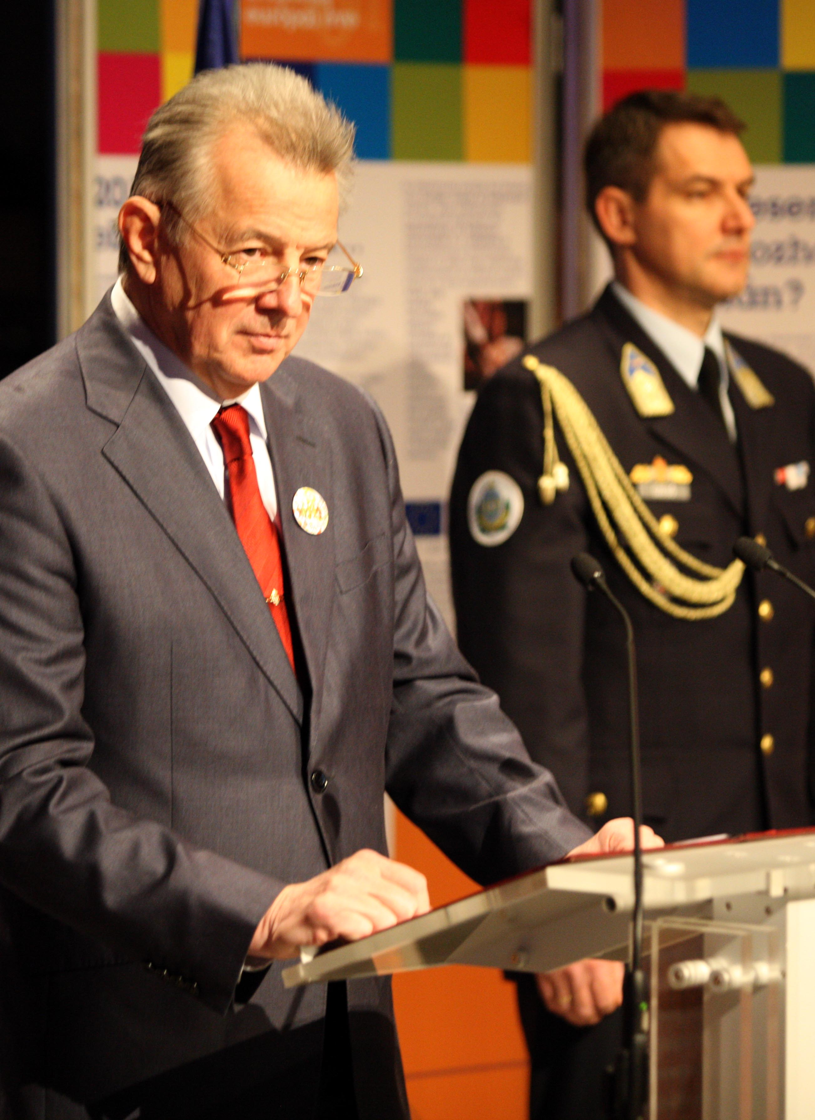 Budapest, 2011.01.08. Schmitt Pál, a Magyar Köztársaság elnöke beszédet tart az önkéntesség európai évének megnyitóján a Millenáris Teátrum épületében. Fotó: Európai Bizottság/Dudás Szabolcs